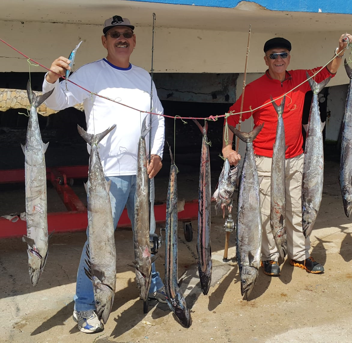 Alberto Costoya y Eduardo Ubierna. miembros del Club de Yates del Quisco pescando sierras